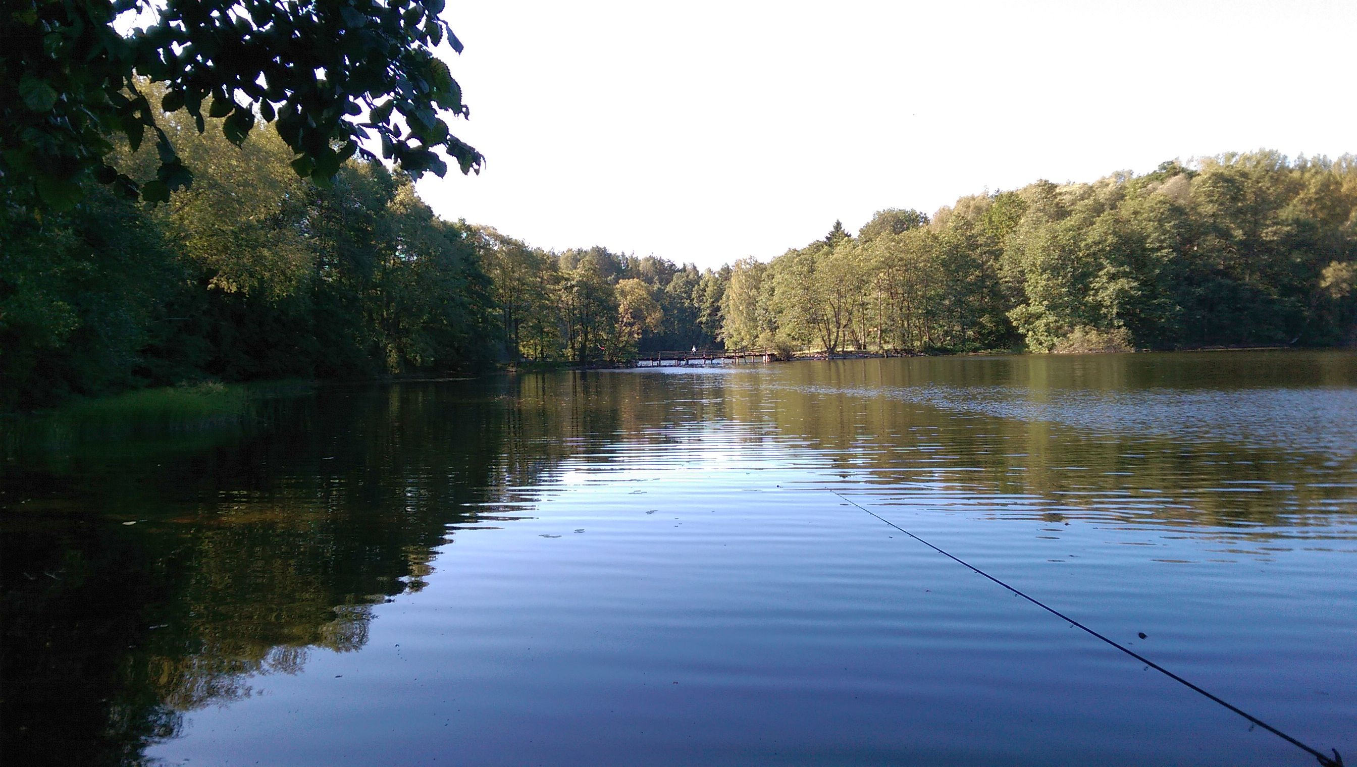 Widok na most